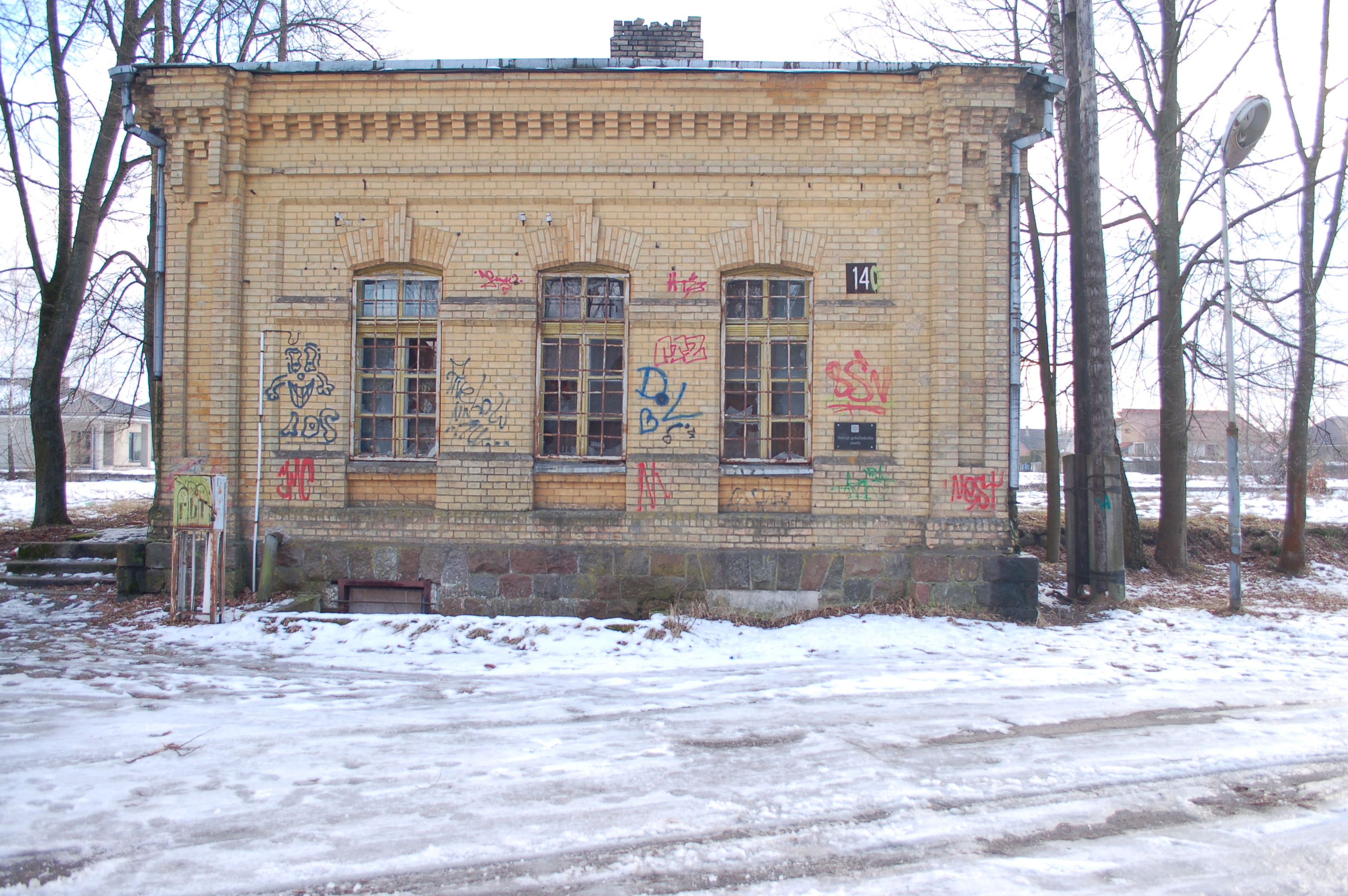 Alytaus senosios geležinkelio stoties pastato liekanos 2015 metų vasarį.